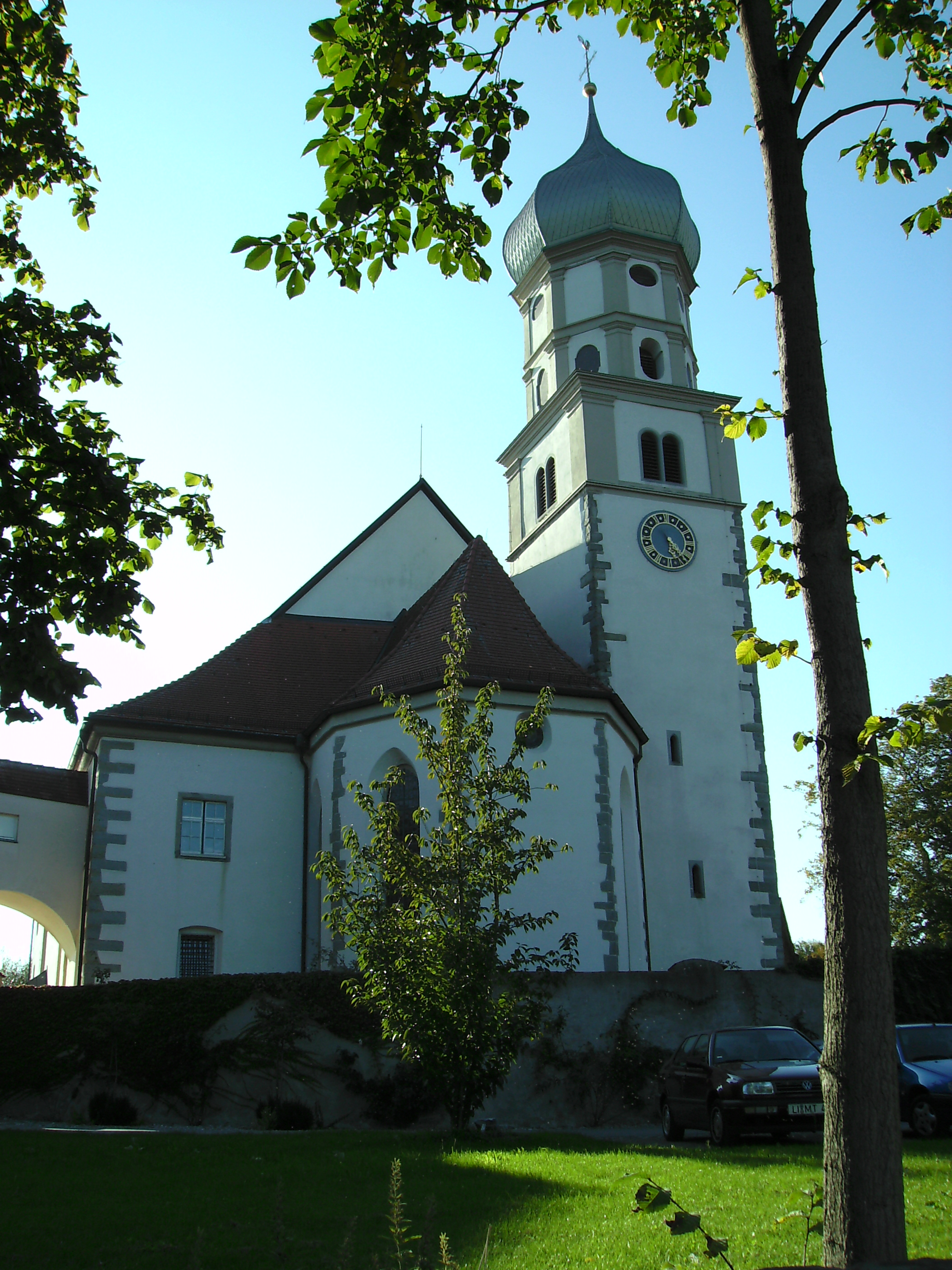 Wasserburg (Bodensee): Kathol. Pfarrkirche St. Georg